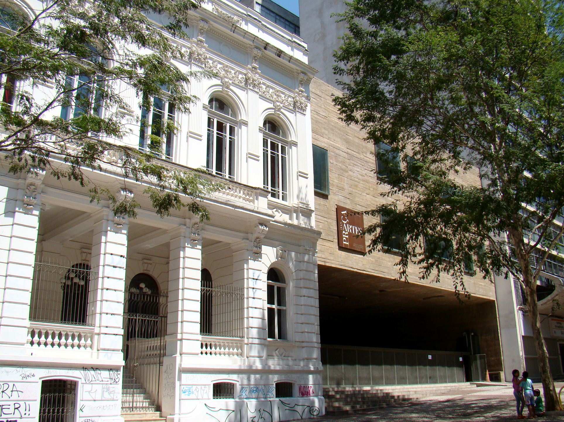 Conservatório Dramático e Musical de São Paulo e prédio da Praça das Artes, no qual é feita a entrada para o conservatório